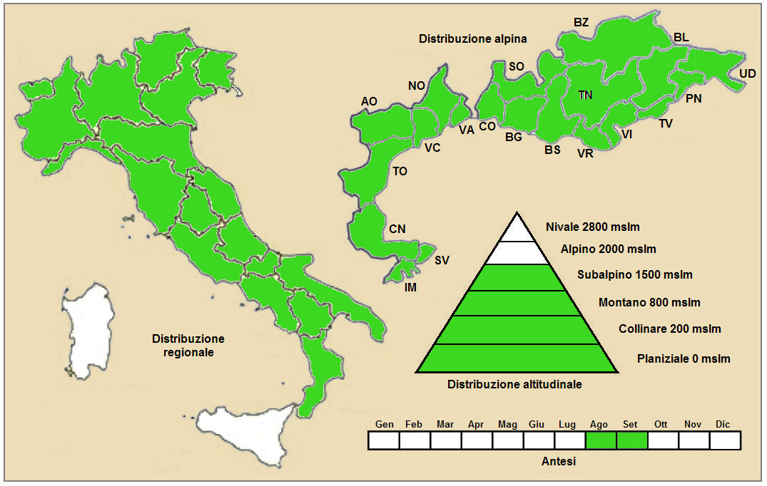 Artemisia absinthium - Distribuzione.PNG